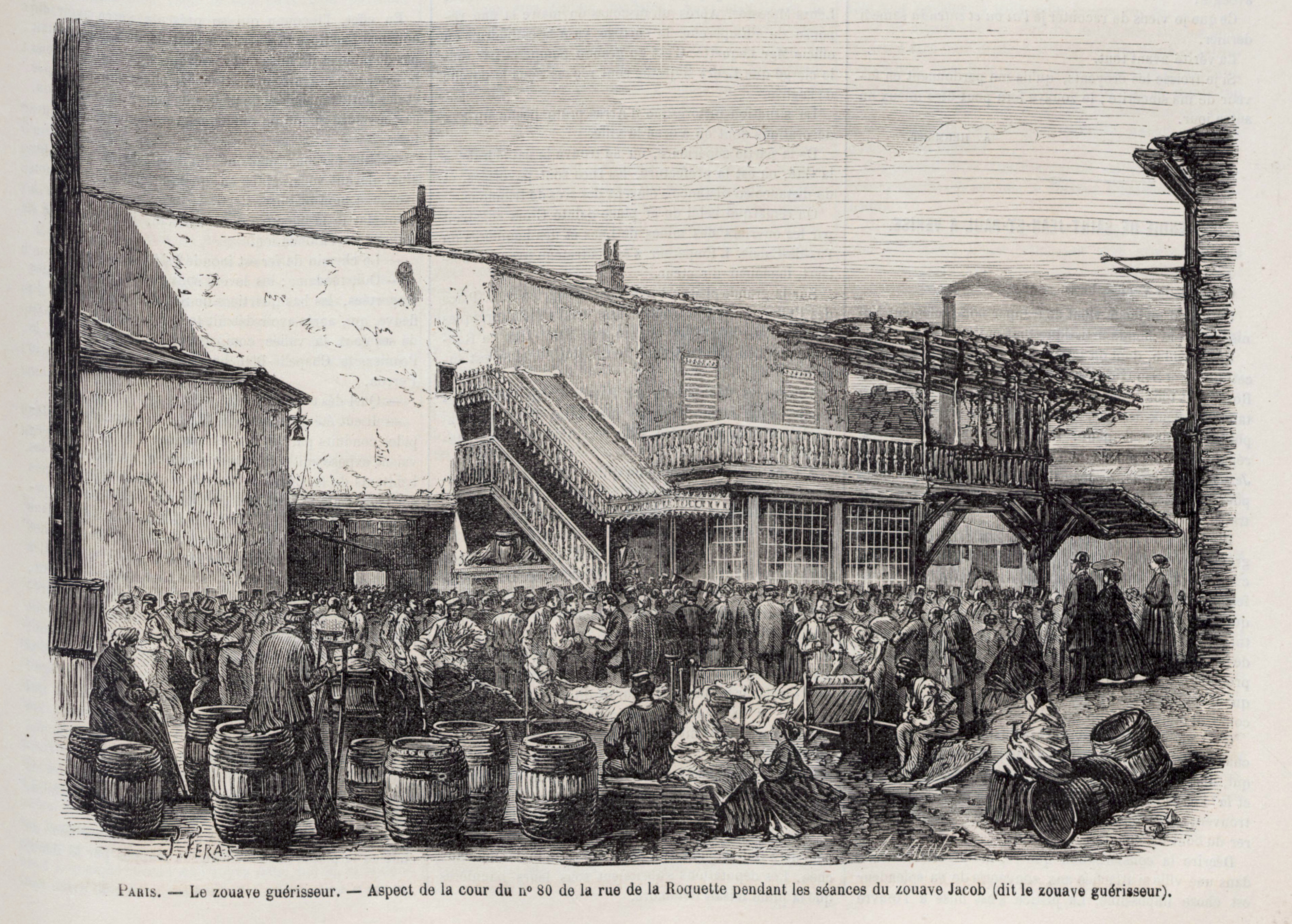 Gravure dans Le Monde illustré.